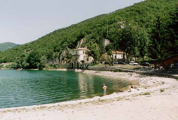 Lago di Scanno (foto scattata da me).